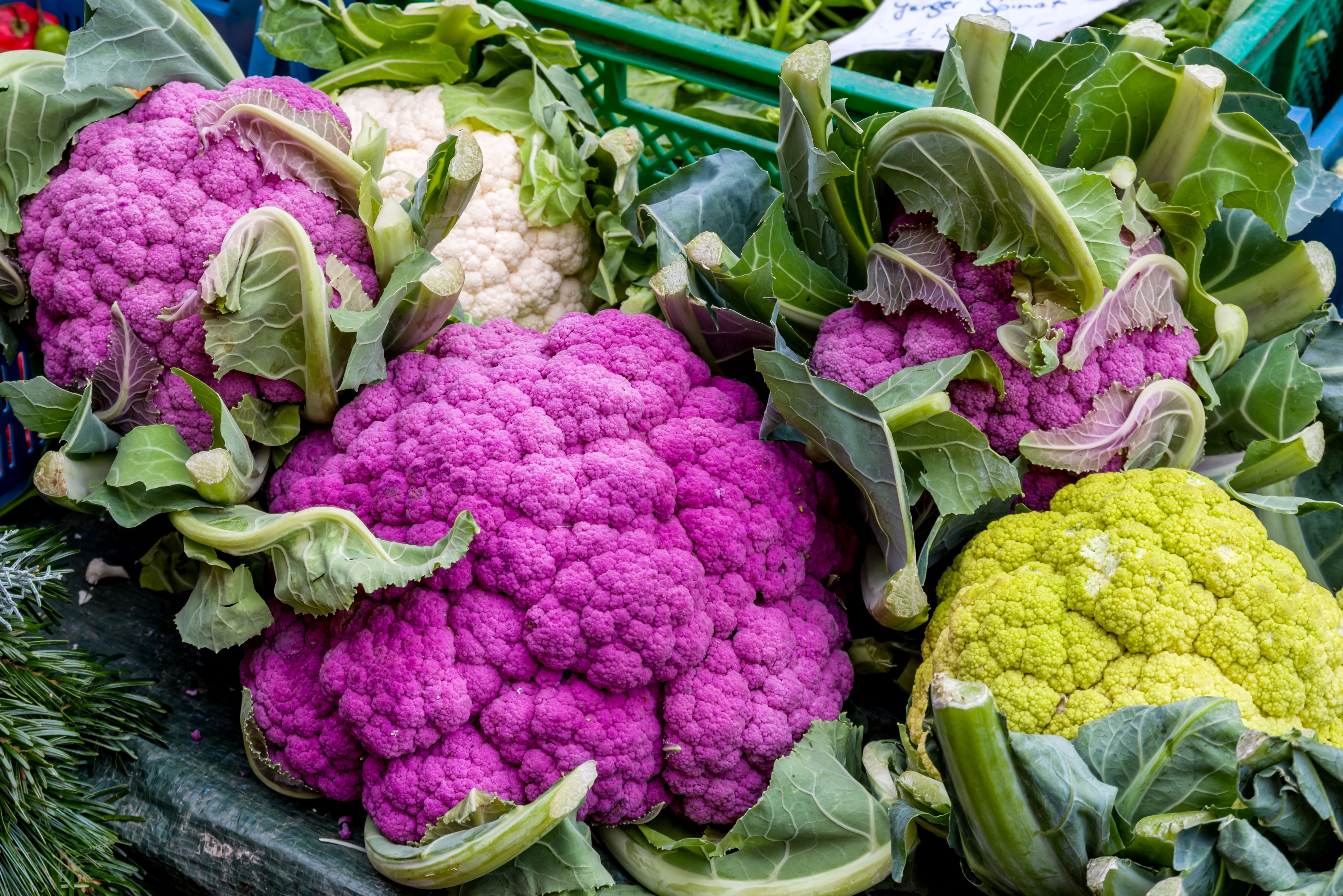 Bilder aus Freiburg